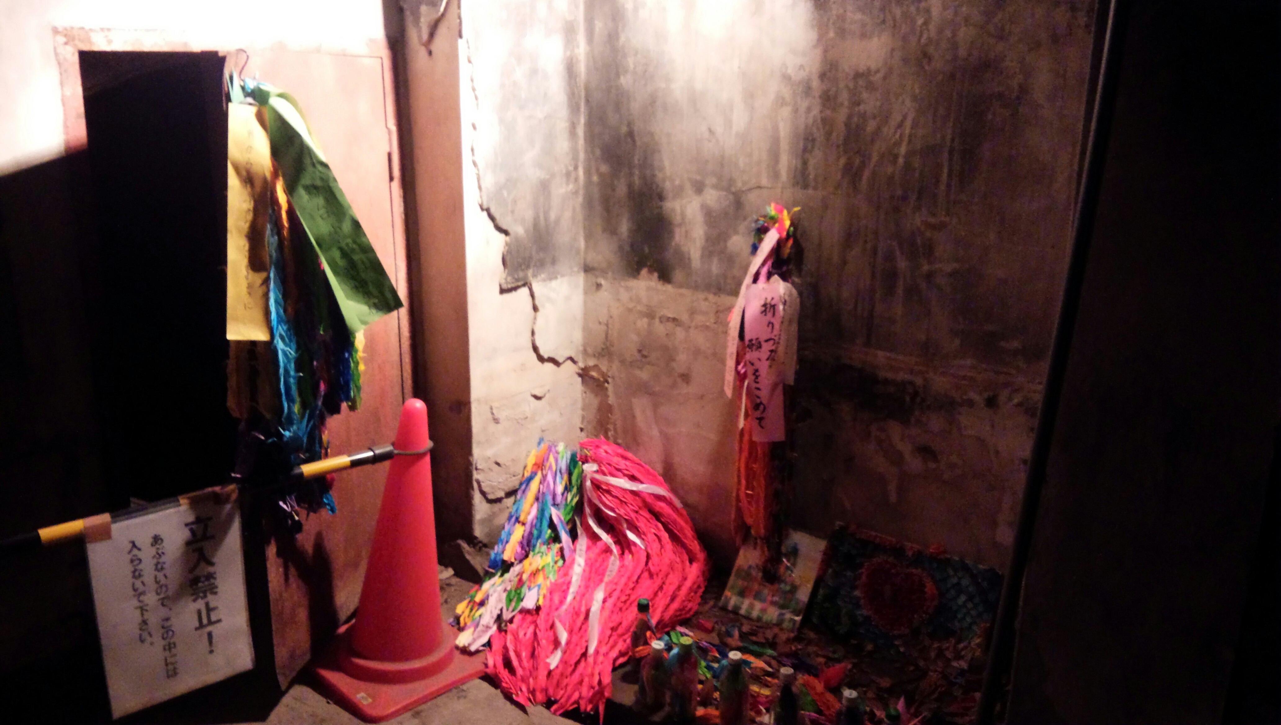 レストハウス (広島市)